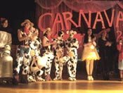 Colles disfressades que participen en els concursos.